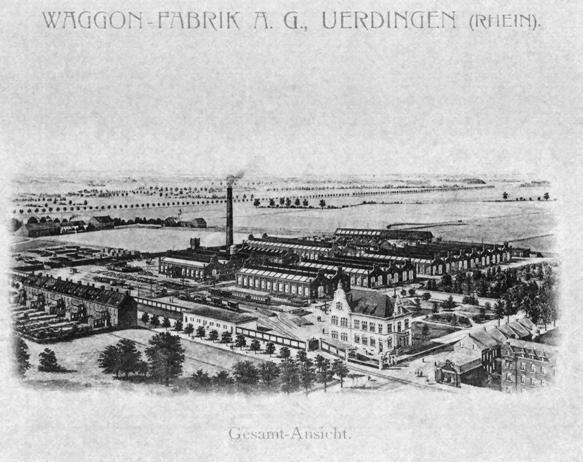 ehemnalige Waggonfabrik Uerdingen, später DUEWAG, heute Siemens